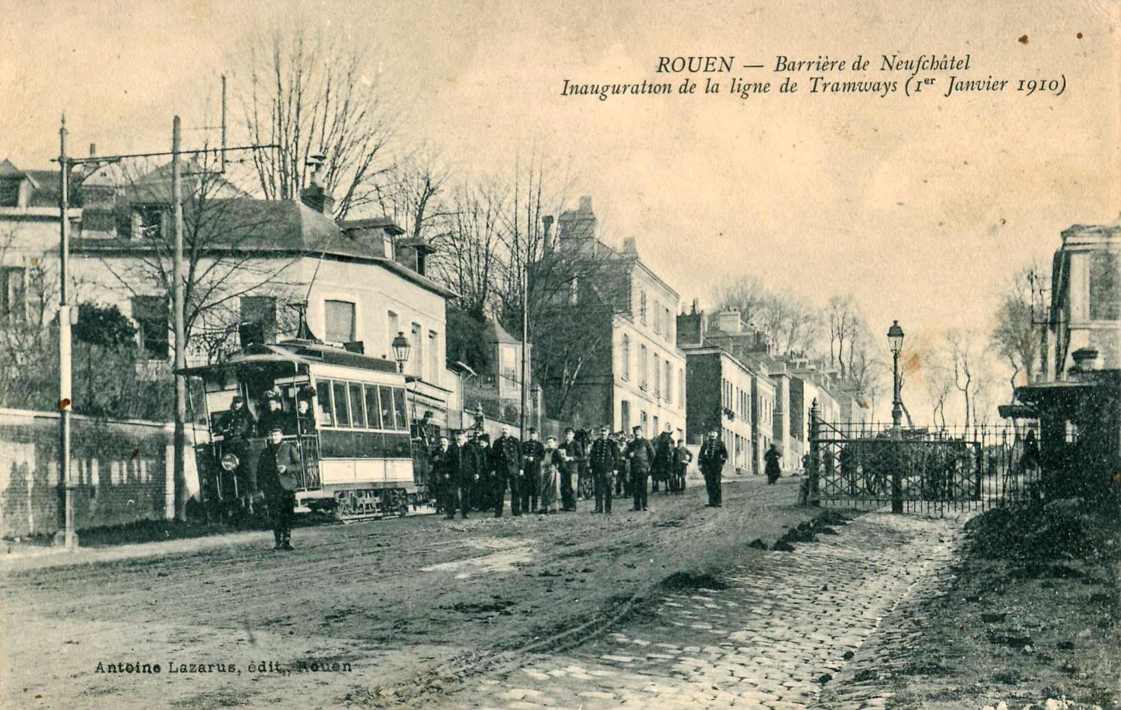 Carte postale ancienne éditée par Antoine Lazarus à Rouen : ROUEN - Barrière de Neufchâtel - Inauguration de la ligne de tramway (1er janvier 1910)